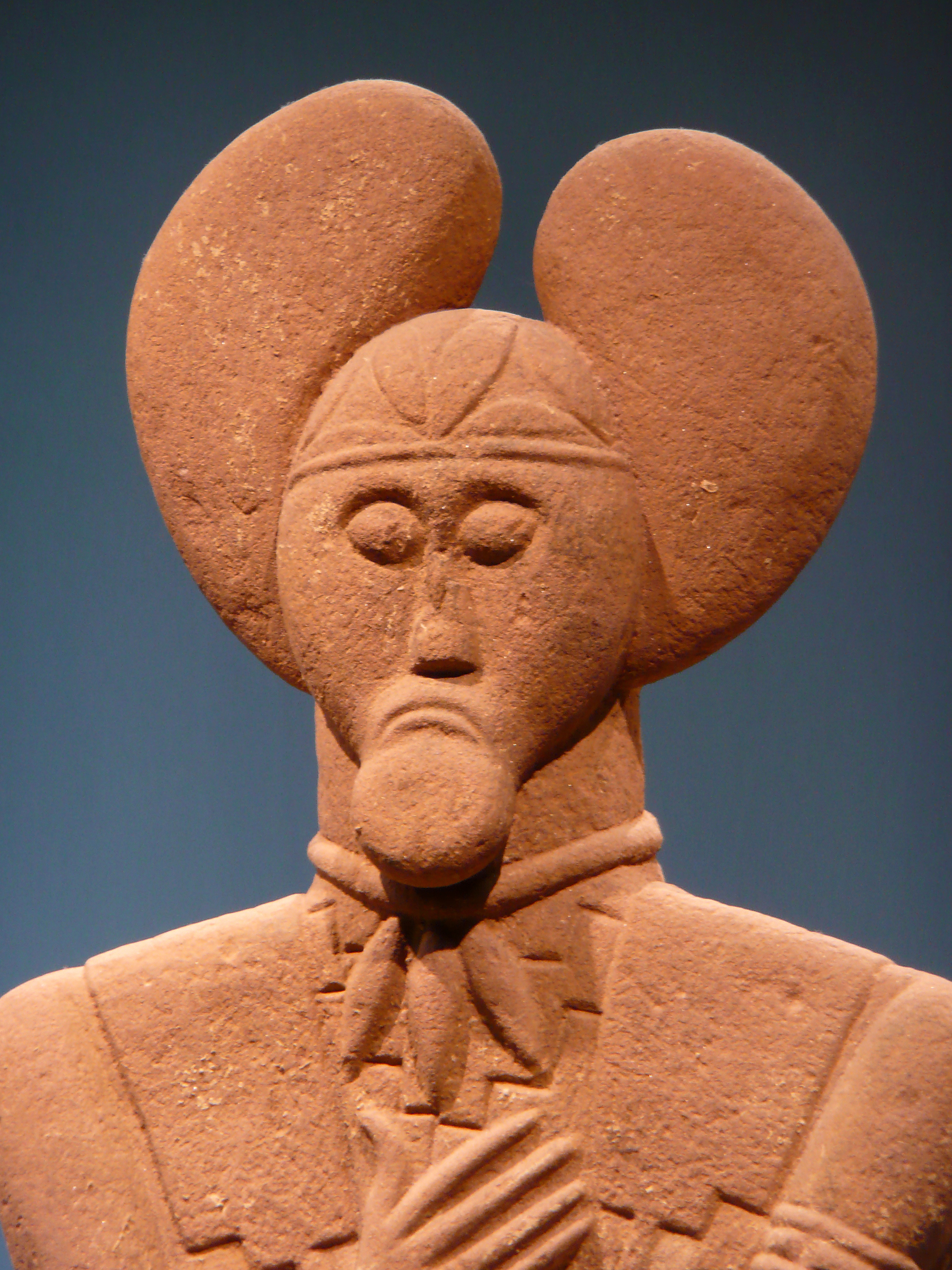 Lebensgroße Sandsteinstatue des 'Keltenfürst vom Glauberg' aus Grab 1 am Glauberg in Hessen, ca. 500 v. Chr., Ansicht von vorne (Detail). Ausstellungort: Museum Keltenwelt am Glauberg.